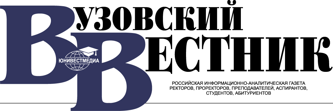 Логотип